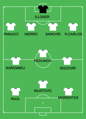 Real Madrid lineup, Real Madrid CF vs. Juventus FC, 20 May 1998